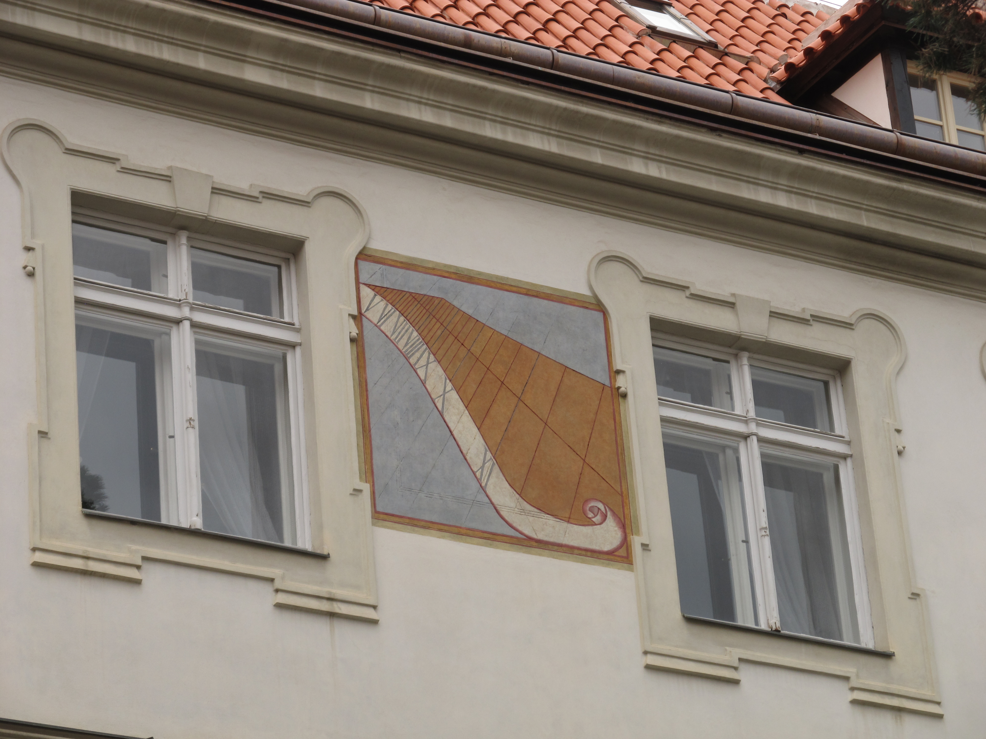 Sluneční hodiny v nádvoří paláce Thurn-Taxisů.